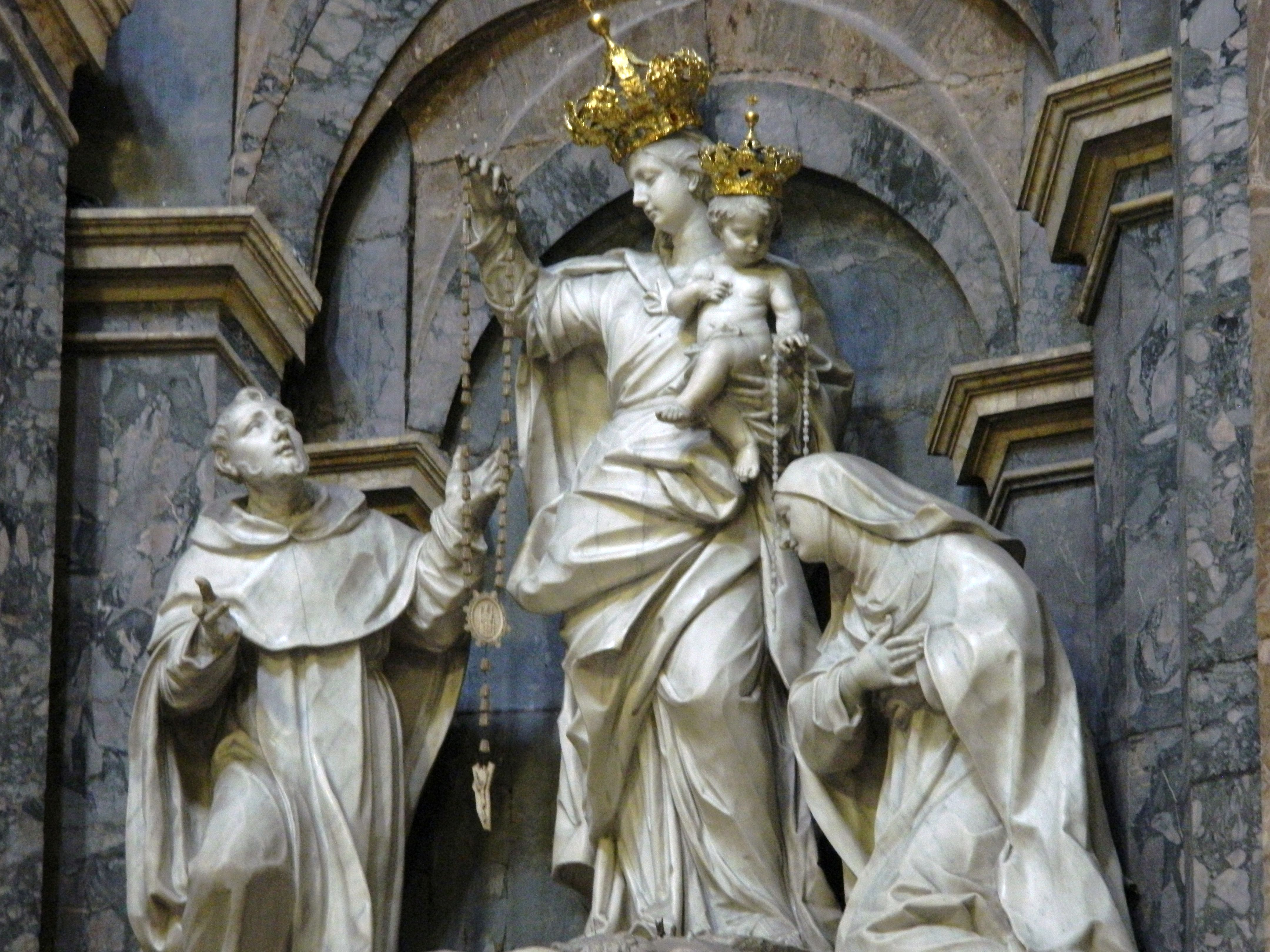 Chiesa di Santa Caterina a Formiello (Napoli) - transetto sinistro, Madonna del Rosario tra santa Caterina da Siena e san Domenico opera attribuita a Paolo Tenaglia su progetto di Carlo Schisano